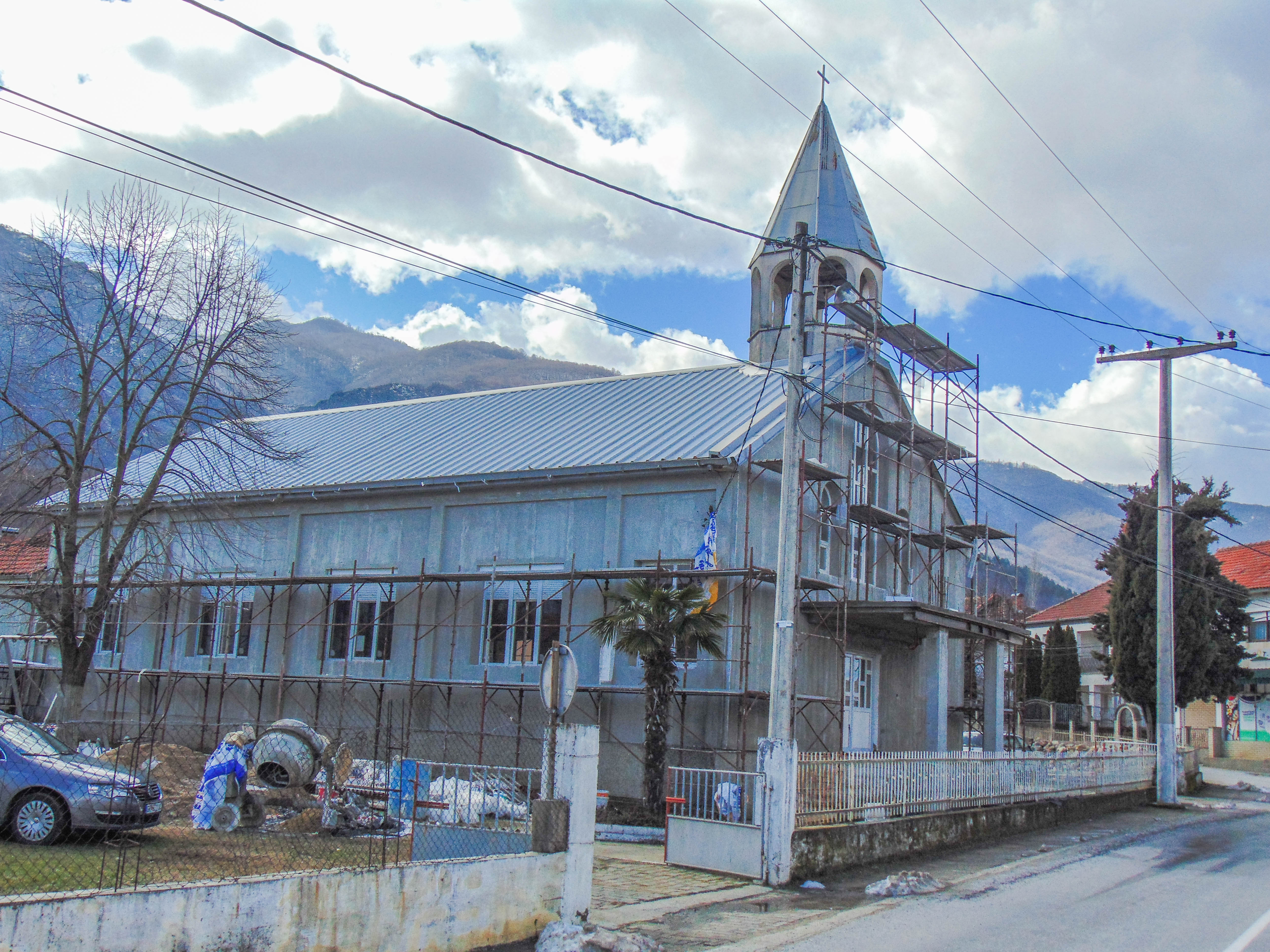 Евангелско-методистичка црква